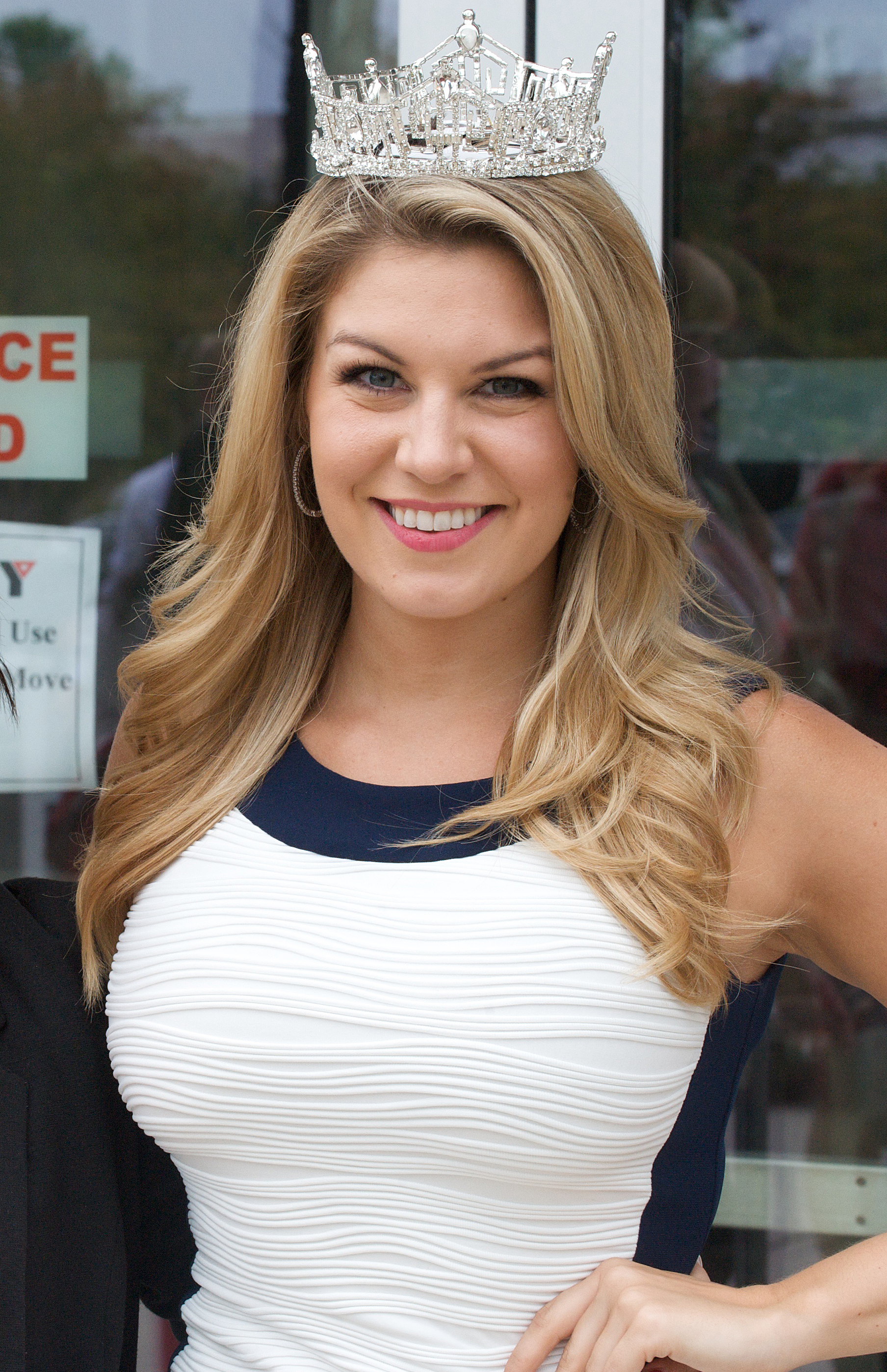 07242013 - LRLM 371